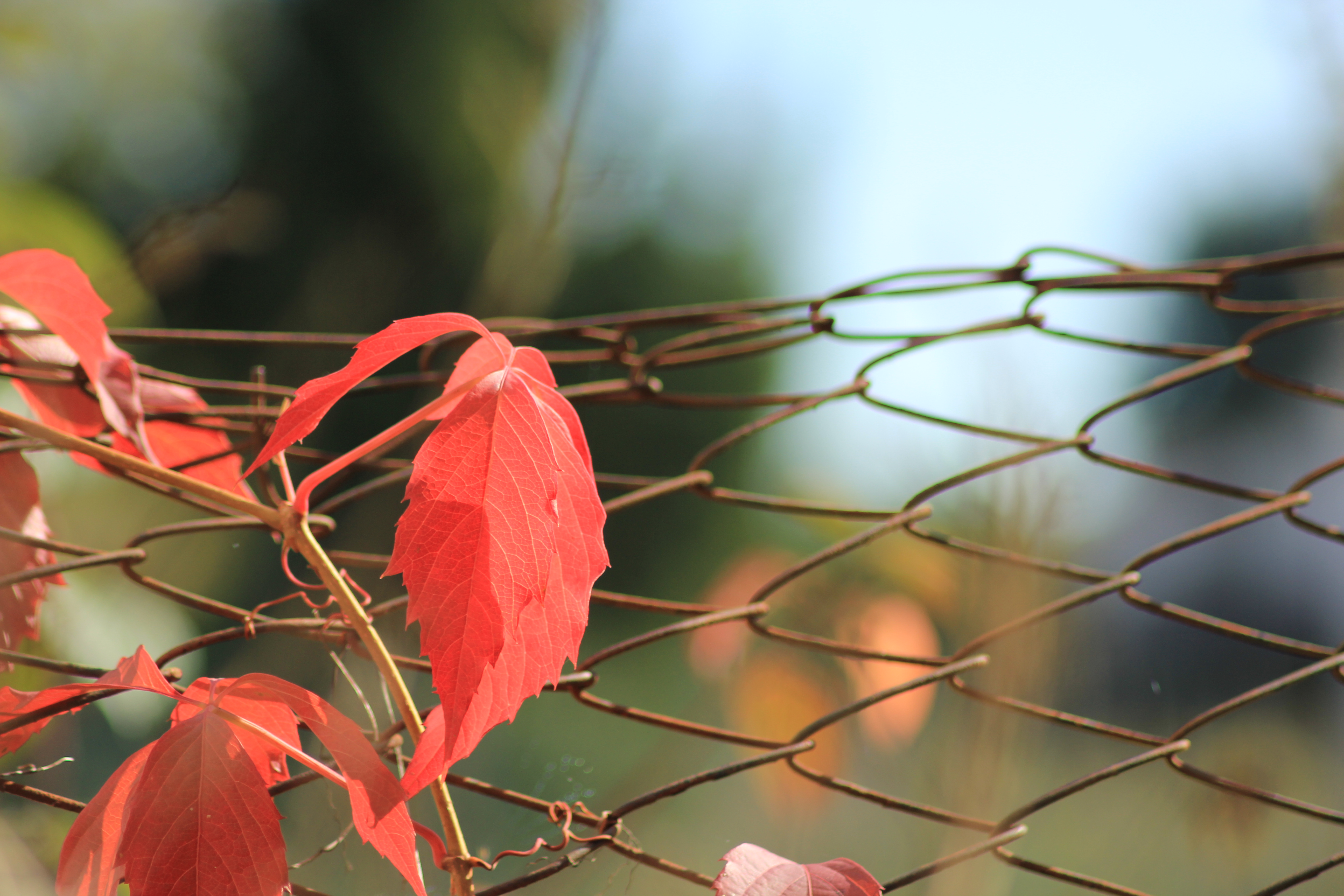 Evidente Aberrazione cromatica di una rete arrugginita, dato lo sfondo molto contrastante